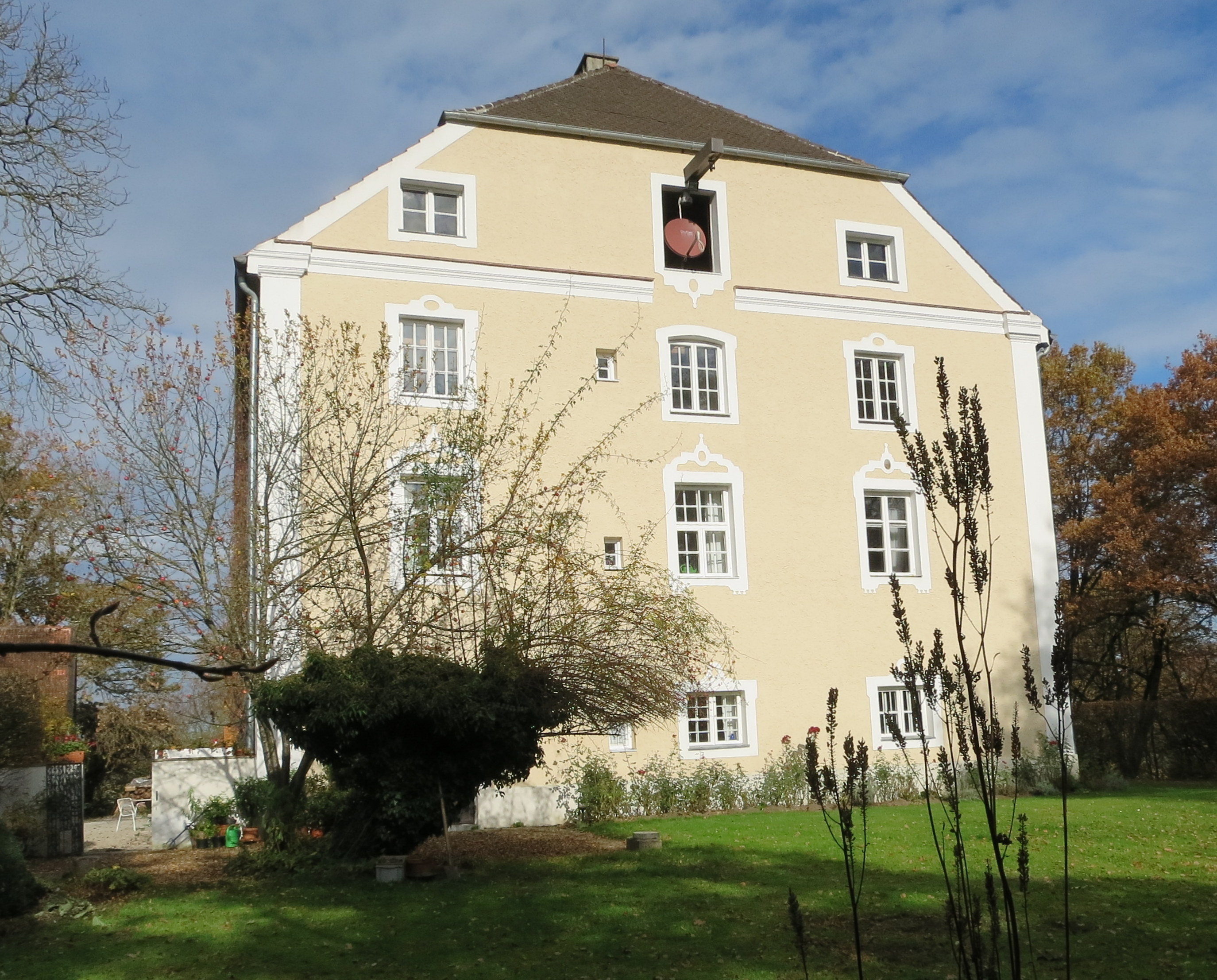 Halbwalmdachbau Schlossstraße 6 in Haindlfing Das ehemalige Hofmarkschloss ist ein dreigeschossiger Bau mit beidseitigem Halbwalmdach und Putzgliederung, um 1740 erbaut, zweites Obergeschoss im Inneren und Dachwerk 1850 nach Brand erneuert (dendrochronologisch datiert) Es ist ein geschütztes Baudenkmal mit der Aktennummer D-1-78-124-262